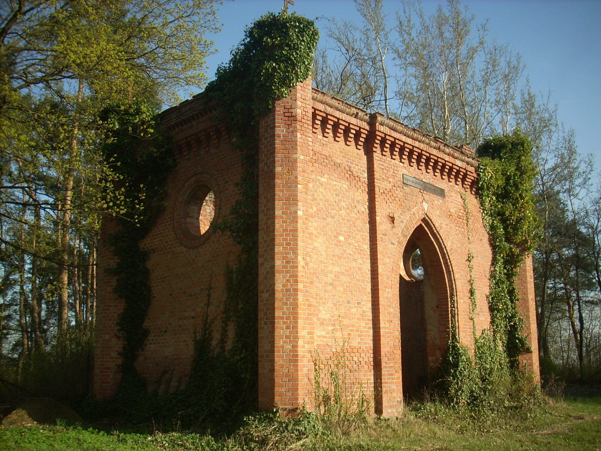 Pomień, kaplica cmentarna, 1852 07.2009.